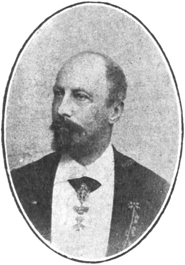 "Le marquis de La Tour du Pin".